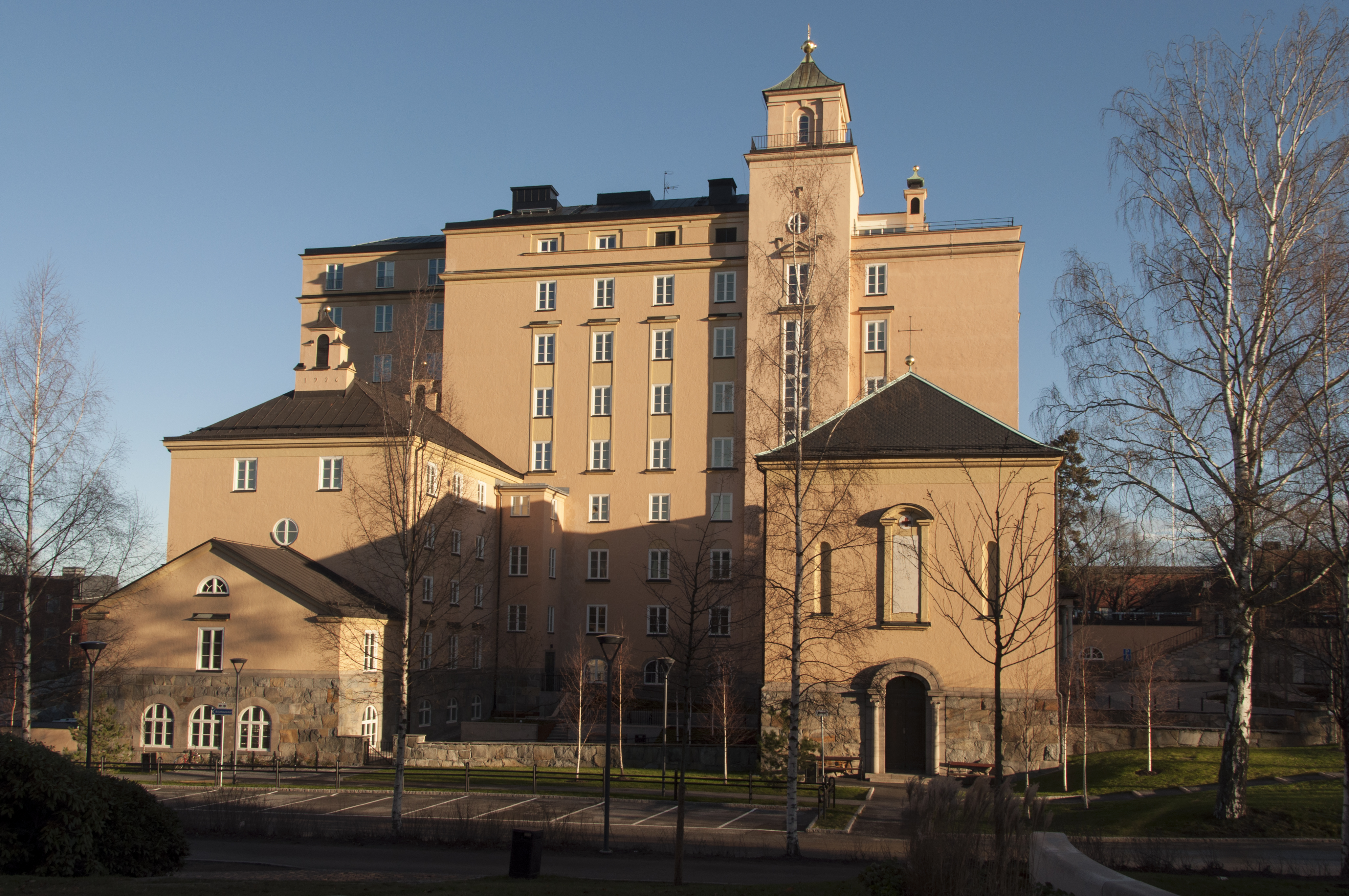 KTH-huset, Brinellvägen 8, byggt 1924-27 som Röda Korsets sjukhem, Arkitekt: Carl Westman